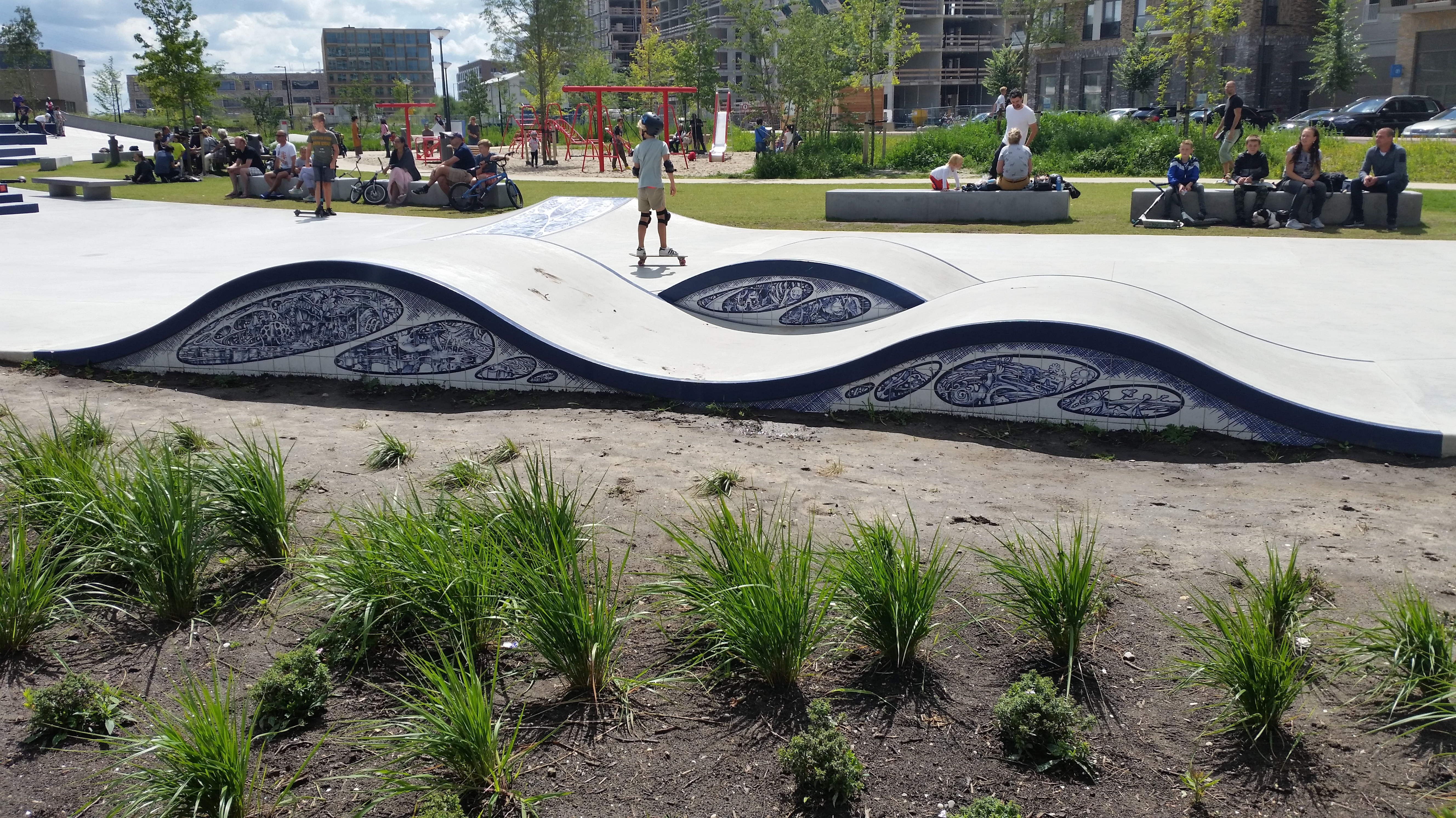 An outcast sanctuary op het skatepark Zeeburgereiland